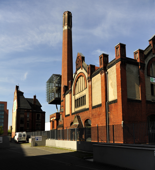 Berliner Kanalisation, Radialsystem V - ehemalige Pumpstation an der Spree, Holzmarktstrasse 33